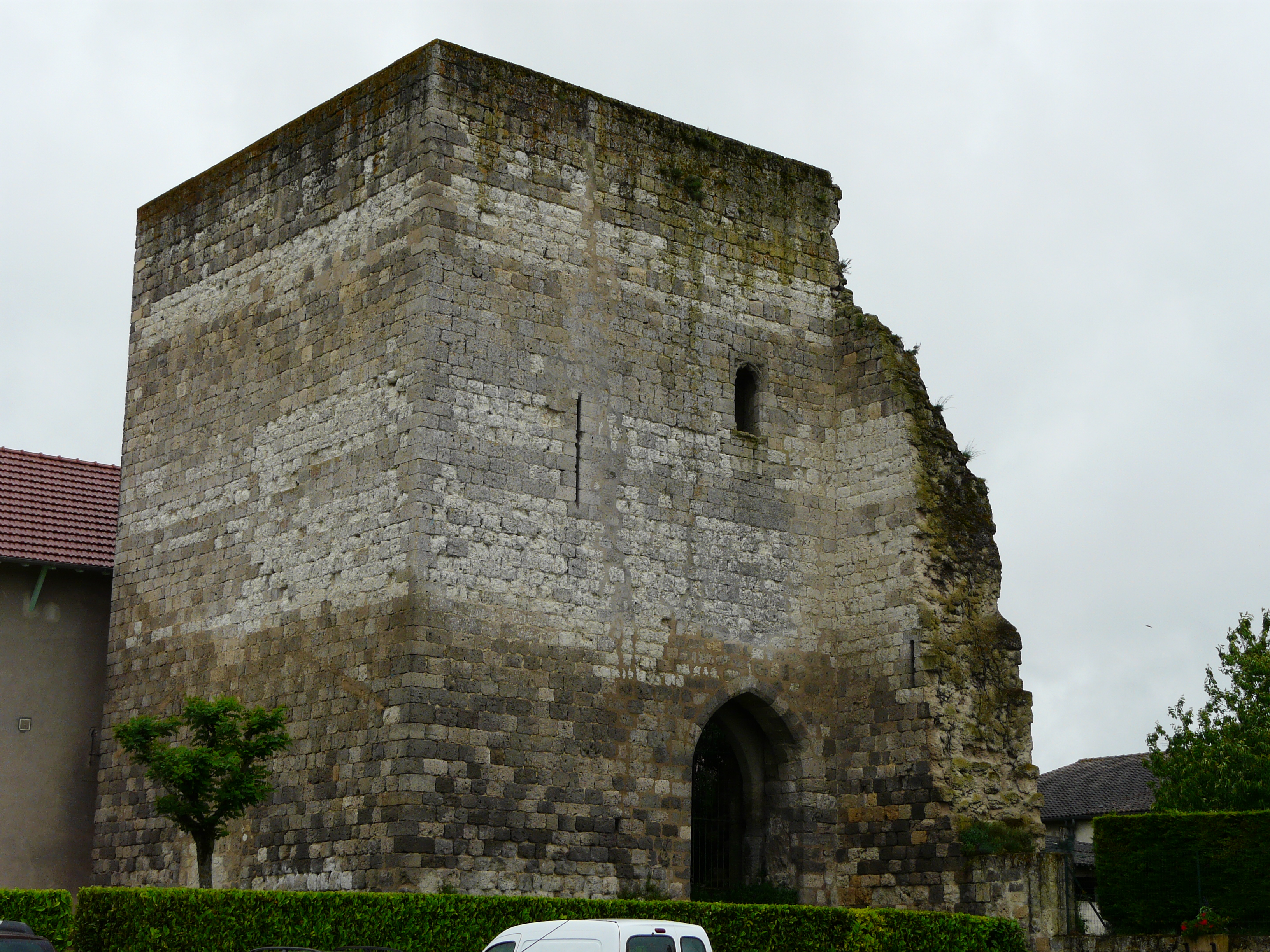 La tour d'Espiens, Lot-et-Garonne, France.